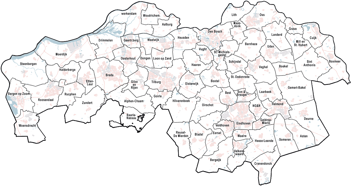 Provincie Noord-Brabant, met indeling van gemeenten (2010). Door Jan-Willem van Aalst, samengesteld uit publiek beschikbare geo-data: Referentie-ondergrond (kustlijn, steden, wegen) gerasterd uit de OpenStreet Map OSM. ( Inhoud is beschikbaar onder de Creative Commons Attribution-ShareAlike 3.0 license. Vectorgrenzen van gemeenten en regio's vrij ter beschikking gesteld met dank aan cartografen van brandweerregio's Hollands-Midden en IJsselland; gerasterd in Photoshop. Overige kenmerken op de kaart: eigen tekenwerk van Jan-Willem van Aalst, op basis van gerasterde gemeentegrenzen.